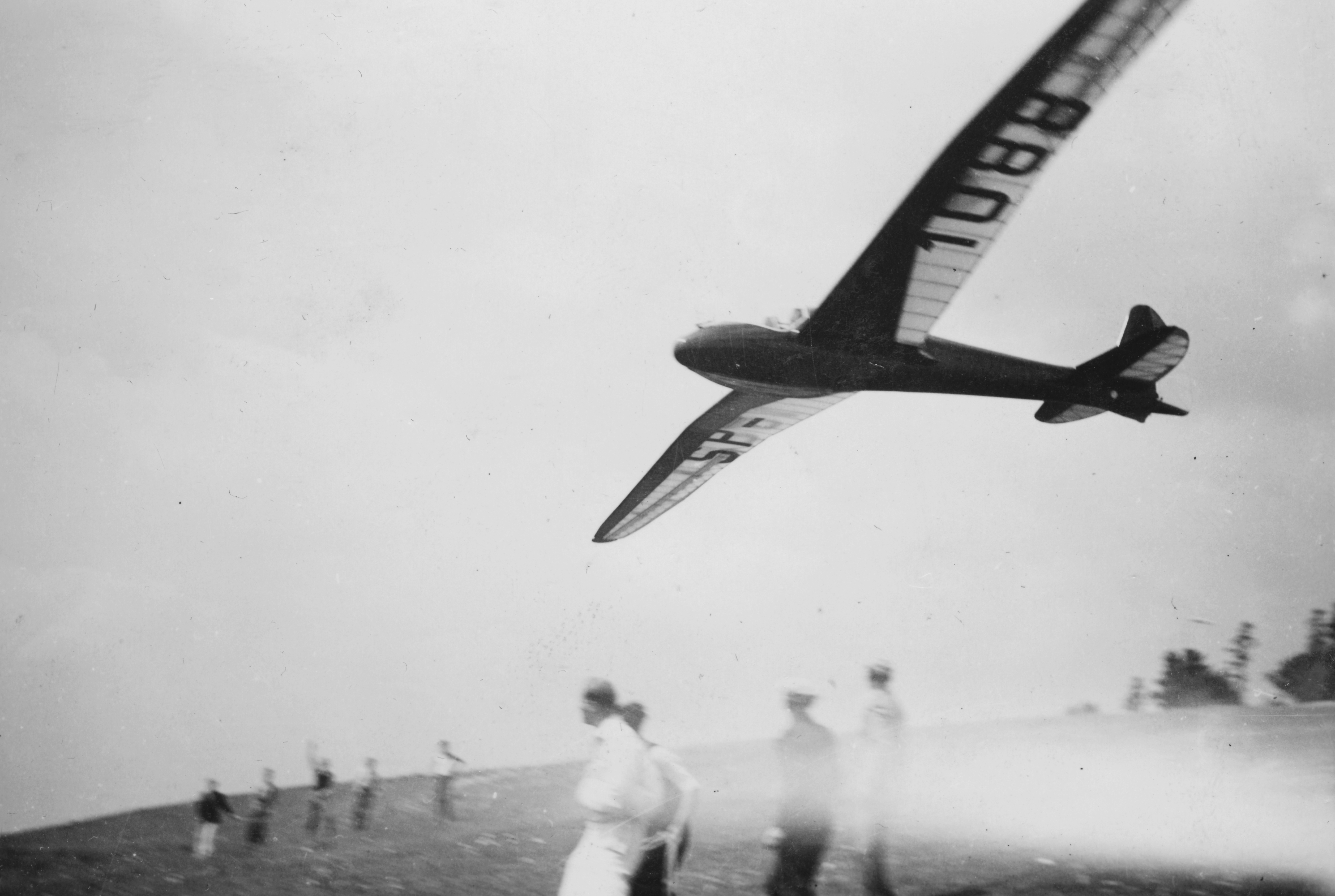 vitorlázórepülőtér, PWS-101 típusú vitorlázó repülőgép. Location: Poland, Bezmiechowa Tags: sailplane, airport, PWS-brand, Polish brand Title: vitorlázórepülőtér, PWS-101 típusú vitorlázó repülőgép.